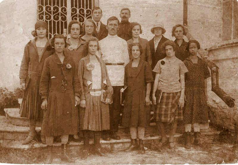 Хор храма Преображения Господня. Начало 1920х годов